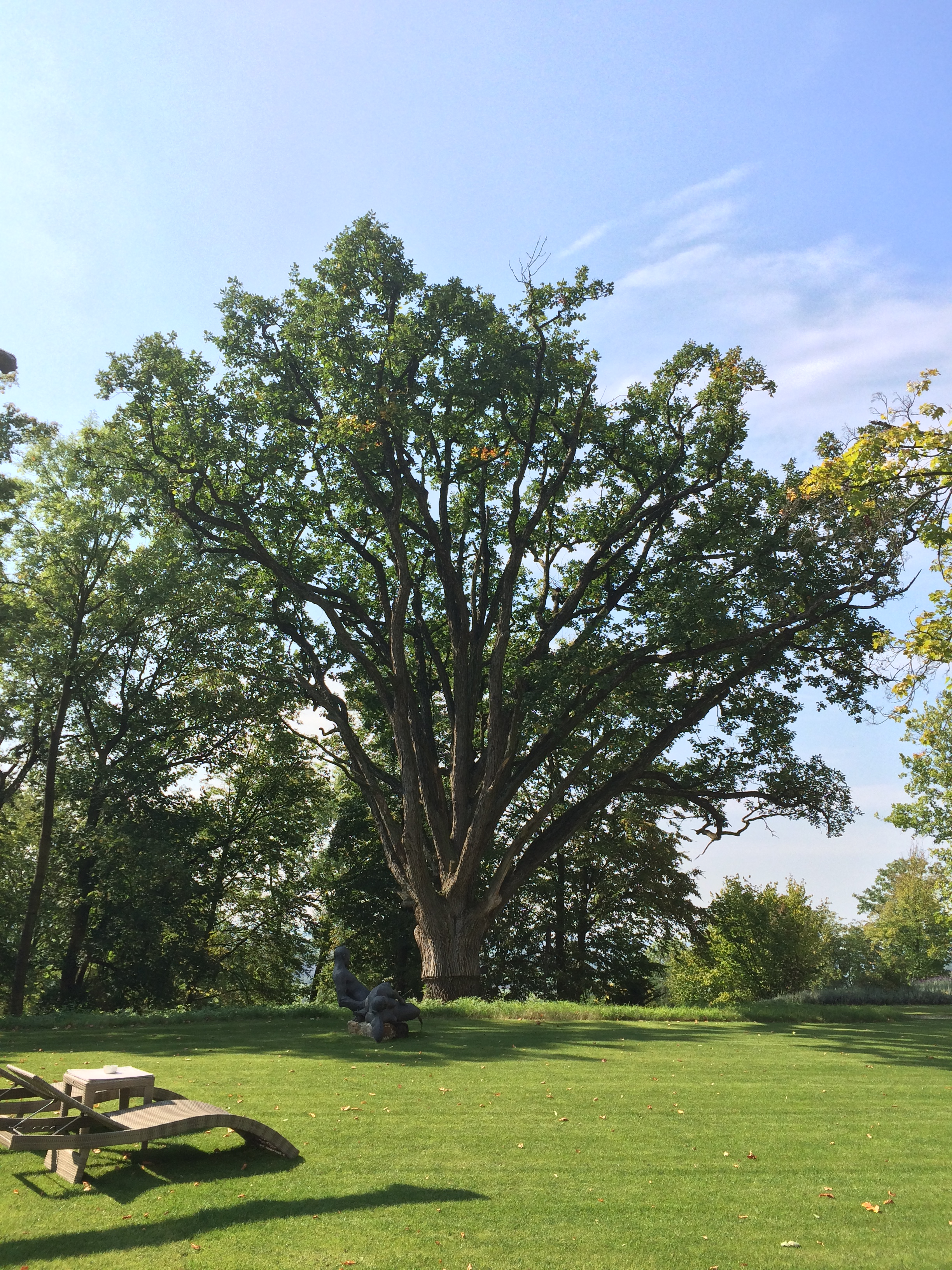 Památný strom, dub velkokvětý, v jižní části zámeckého parku za zámkem Mcely.